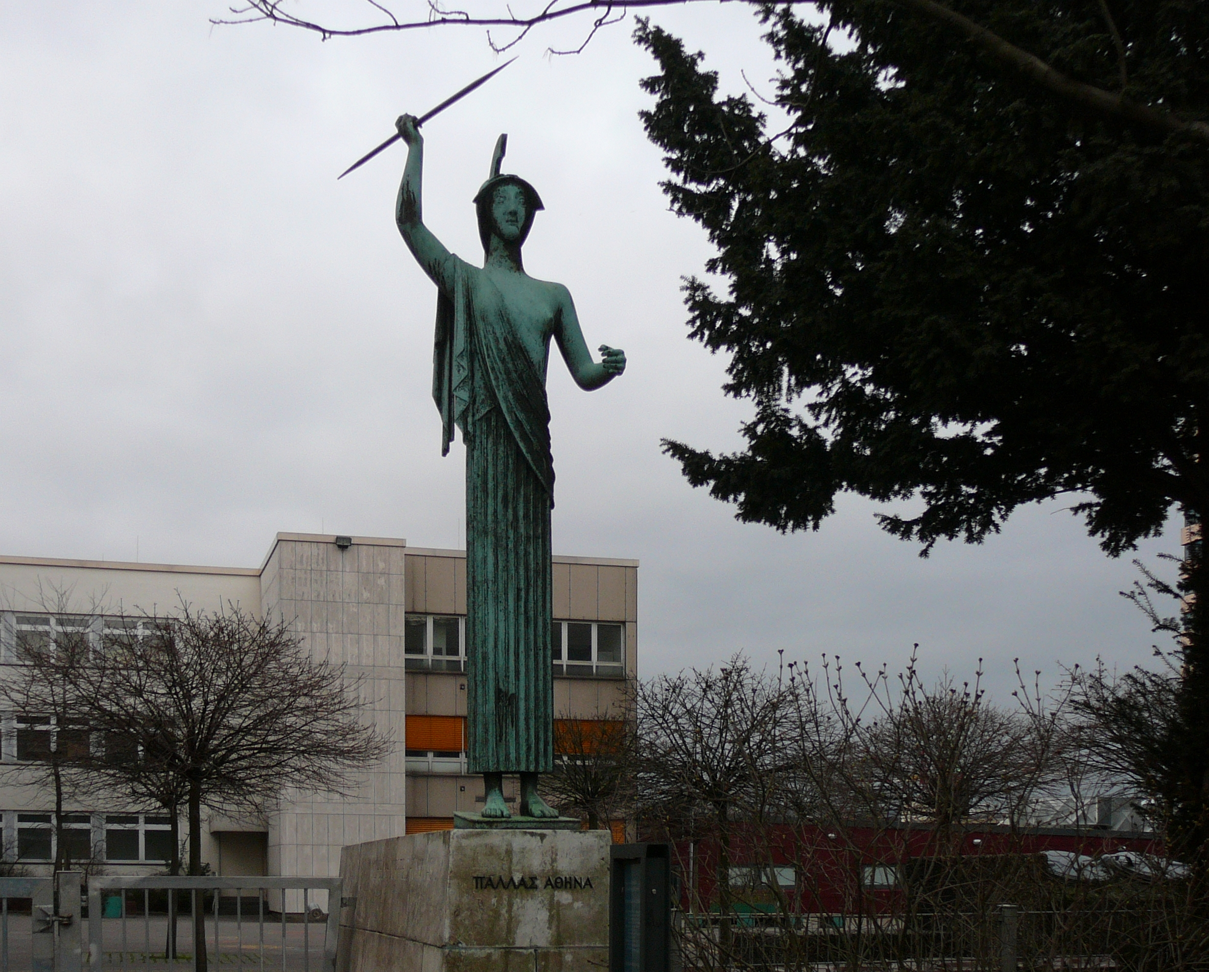 Johannisberg, Wuppertal